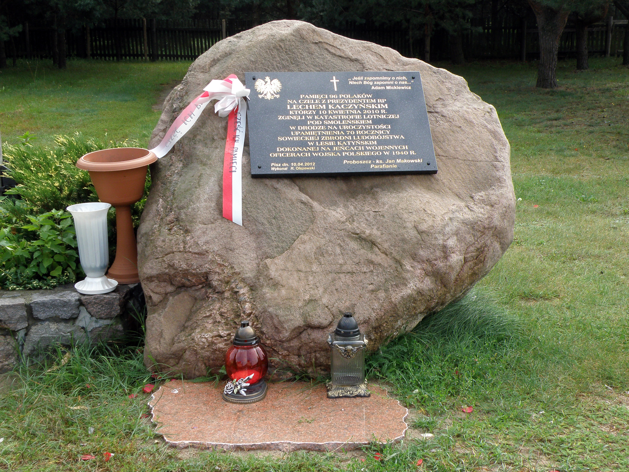 Polska, Pisz - Parafia rzymsko-katolicka Najświętszego Serca Pana Jezusa This photo of Warmian-Masurian Voivodeship was taken during Wikiexpedition 2012 set up by Wikimedia Polska Association. You can see all photographs in category Wikiekspedycja 2012. The making of this document was supported by Wikimedia Polska.